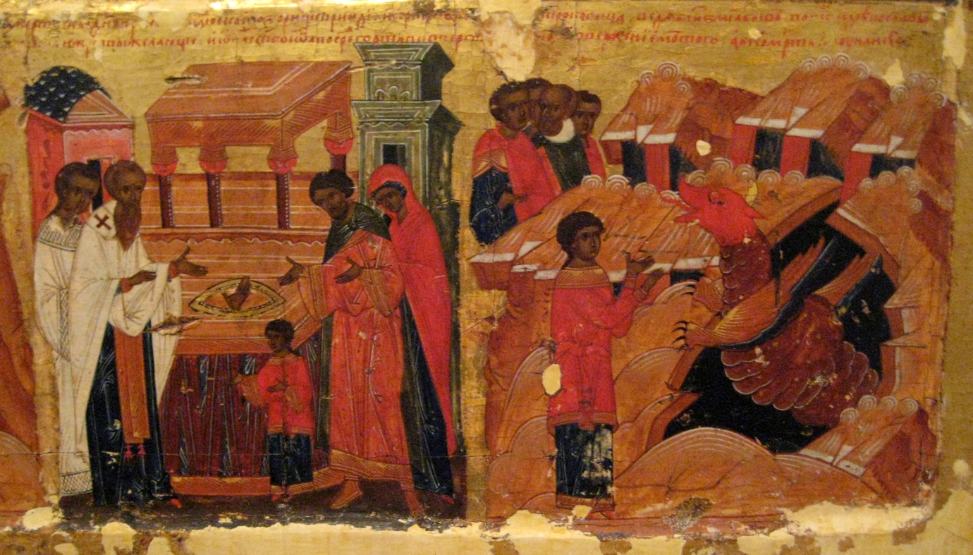 Иоанн Креститель, Ангел Пустыни, с житием в 18 клеймах.Нижегородский государственный художественный музей. John The Baptist Angel of Desert, with 18 scenes of life